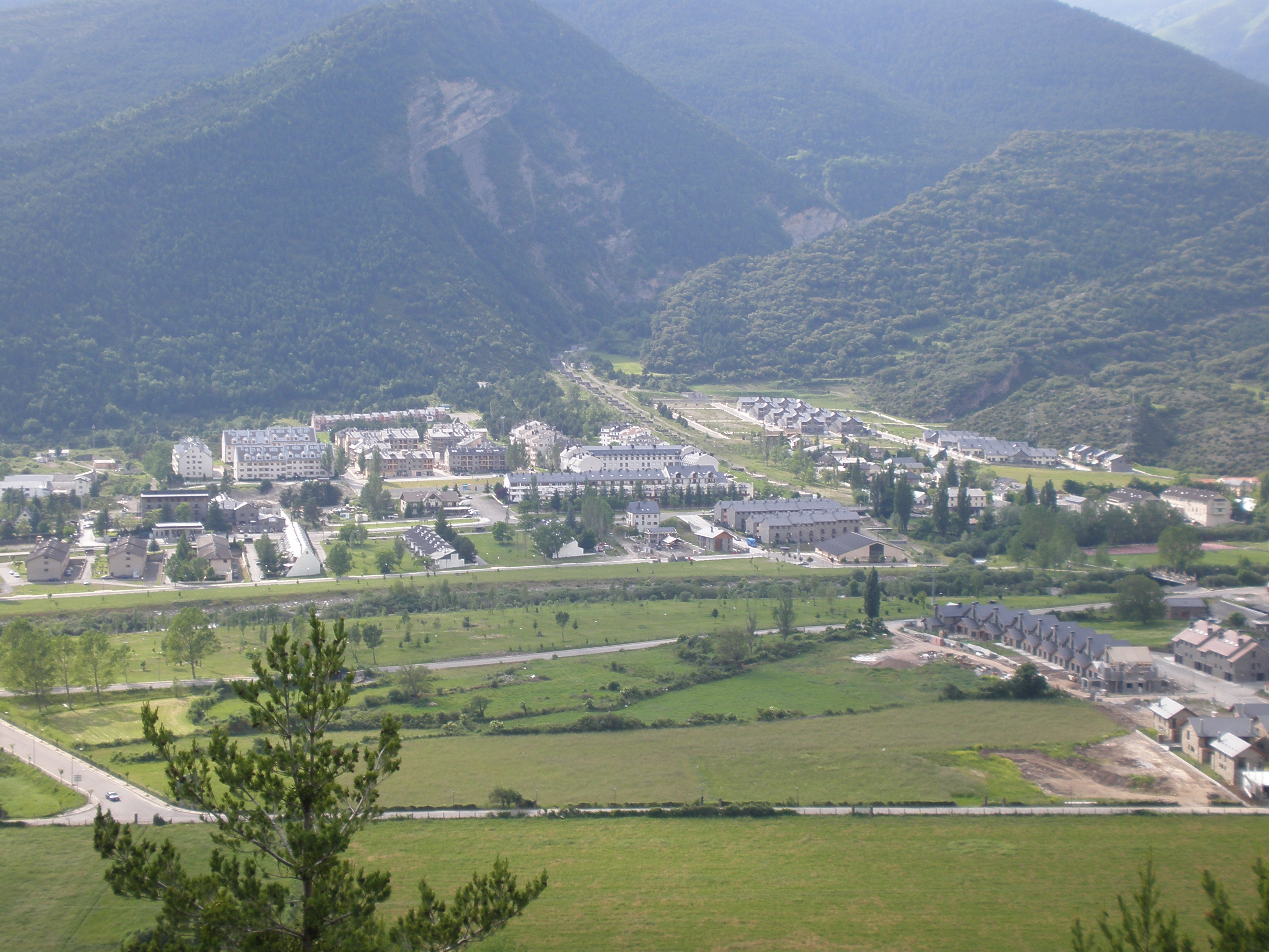 Barrios del Arrabal y La Espata de Villanúa